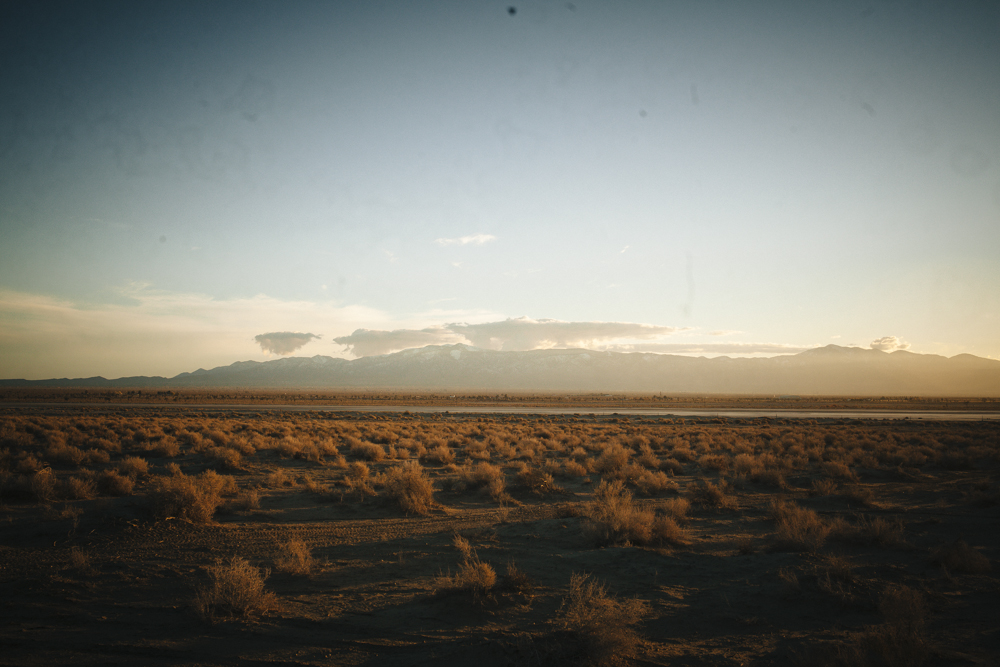 엘 미라주 드라이 레이크의 사진